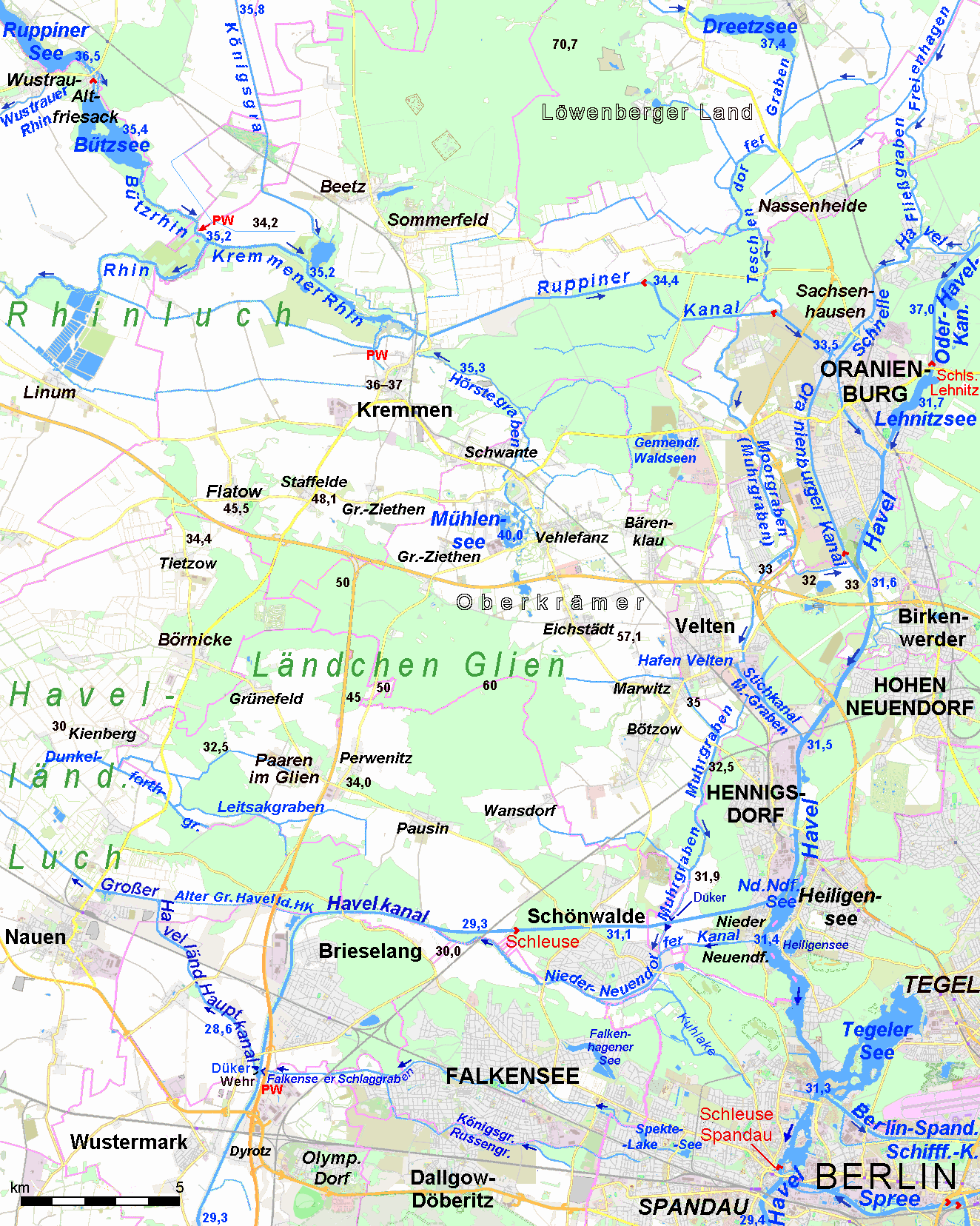 Mehrere Gewässer in der Umgebung des Ländchens Glien: Havel, Havelkanal, Ruppiner Kanal und andere zweige des Rhin, Nieder-Neuendorfer Kanal, Muhrgraben, Moorgraben This map may be incomplete, and may contain errors. Don't rely solely on it for navigation.